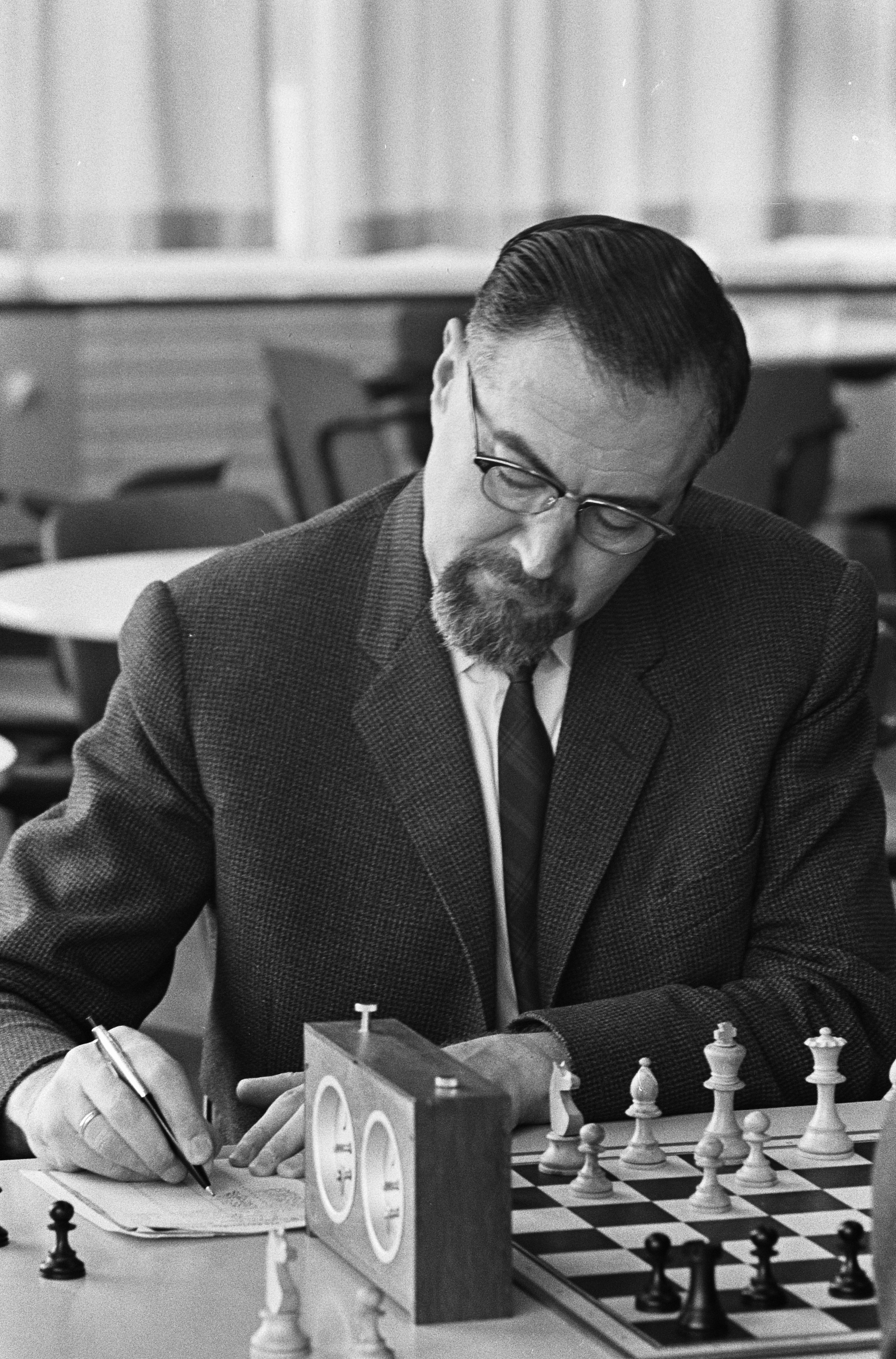 Tweekamp tussen de schakers Coen Zuidema en Lodewijk Prins (rechts) in het kader van het Nederlands Kampioenschap schaken 1965 in het gebouw van het GAK te Amsterdam (Lodewijk Prins werd hierbij Nederlands kampioen).